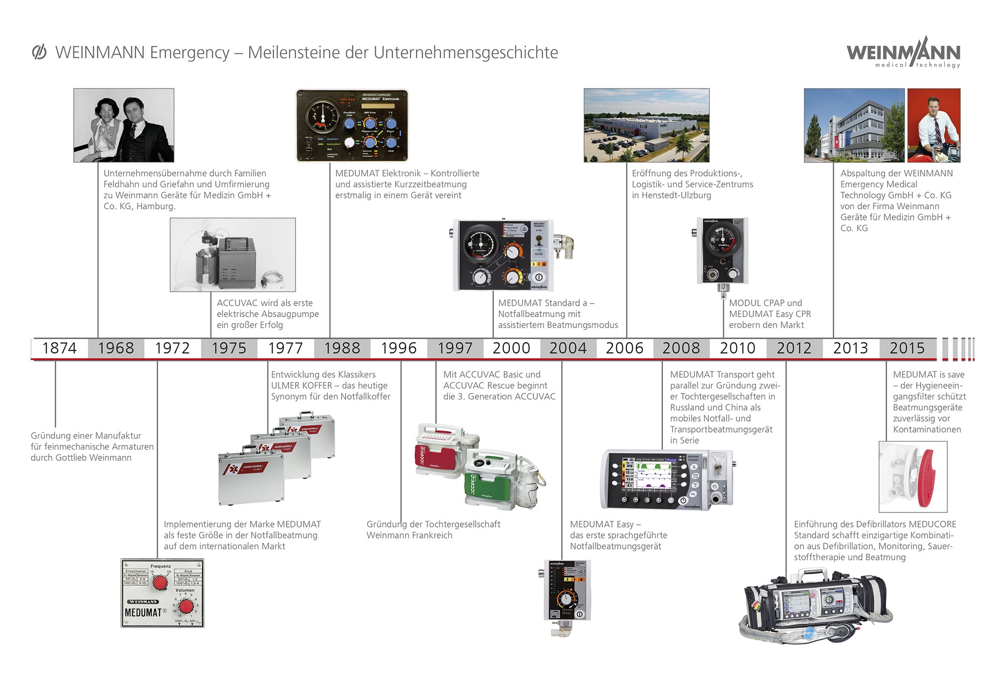 Zeitstrahl zur Unternehmensgeschichte von WEINMANN Emergency